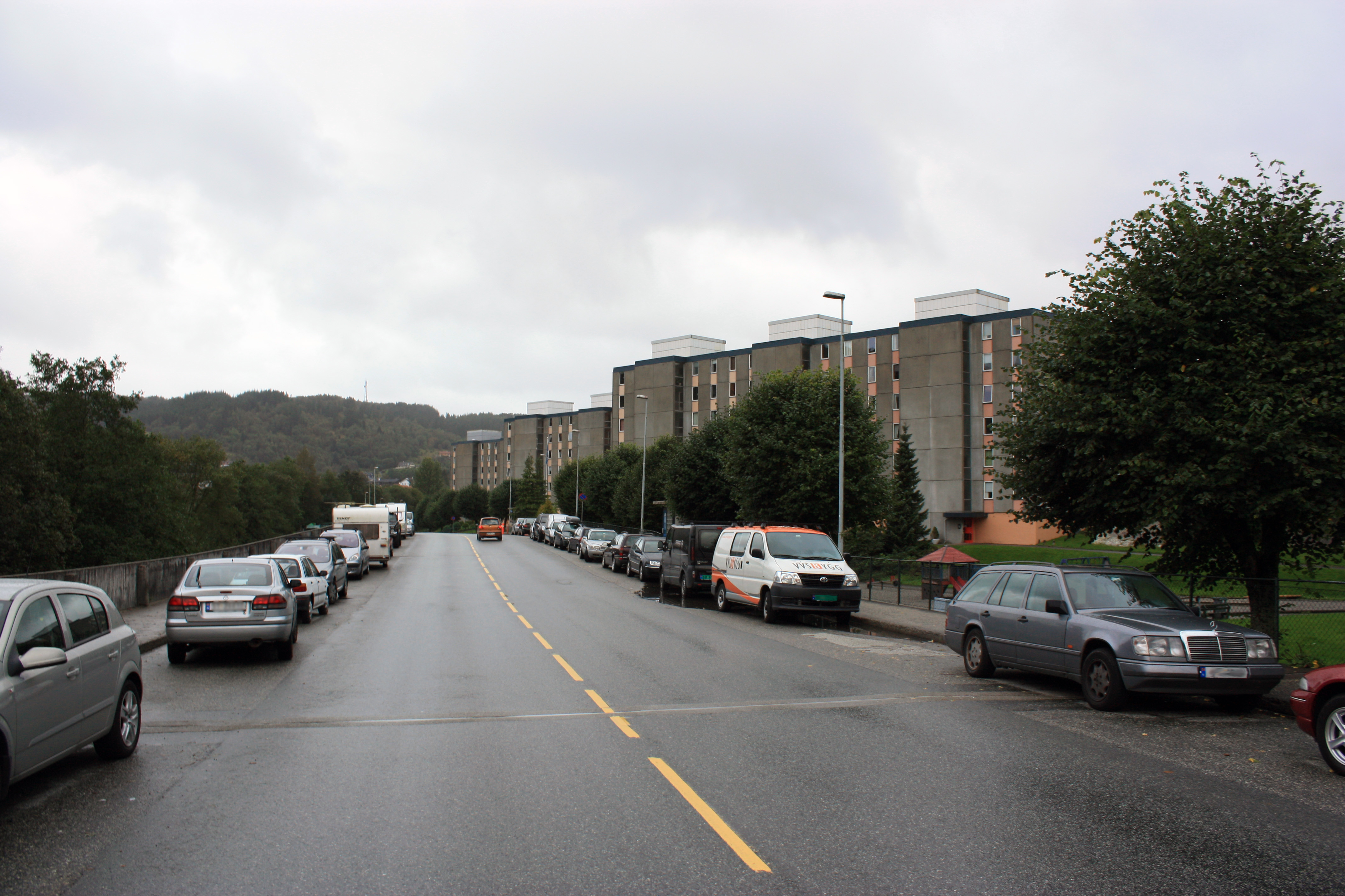 Elvenesvegen, Fana, Bergen.